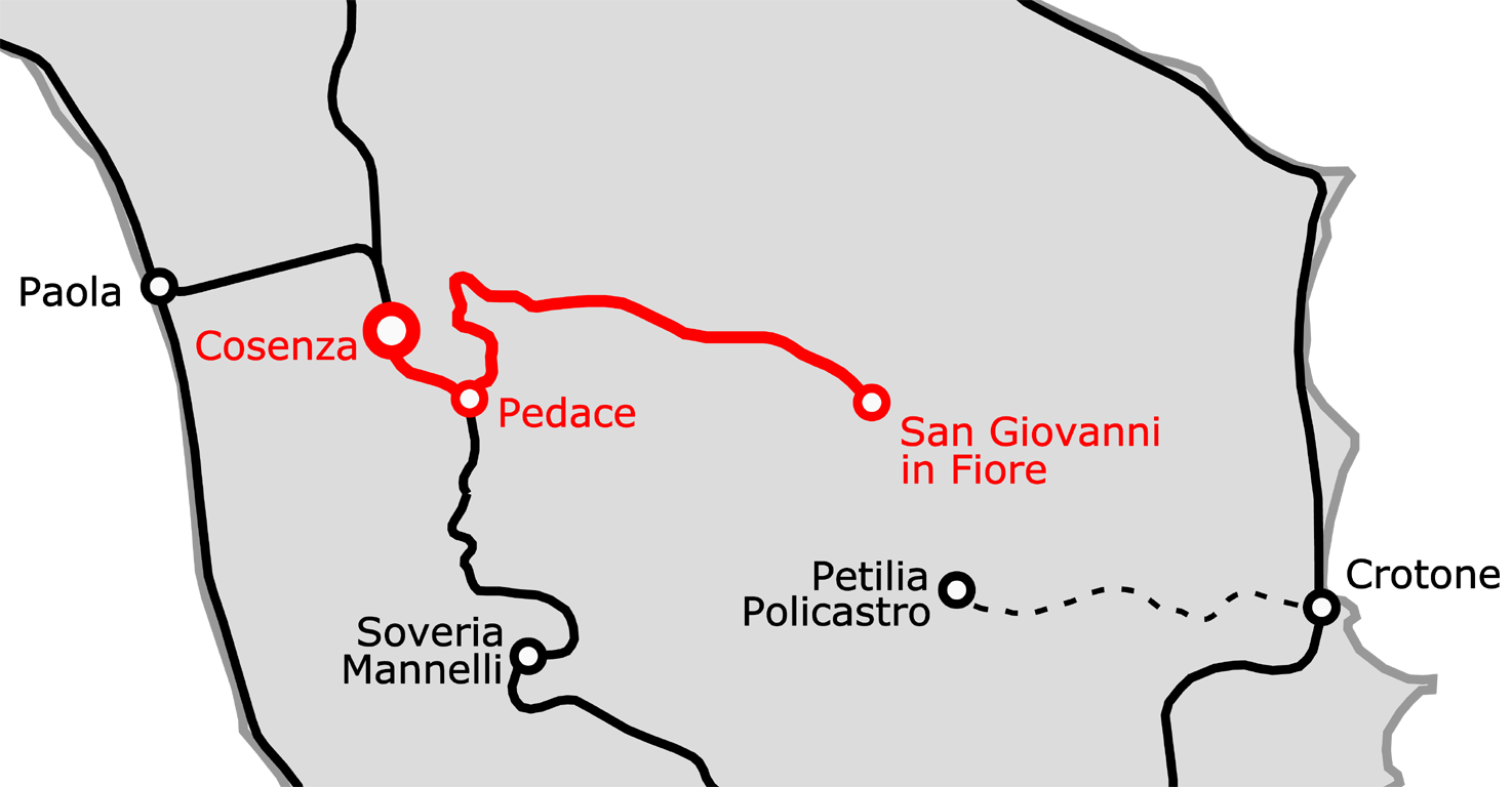 Tracciato della ferrovia Cosenza-San Giovanni in Fiore delle Ferrovie della Calabria.